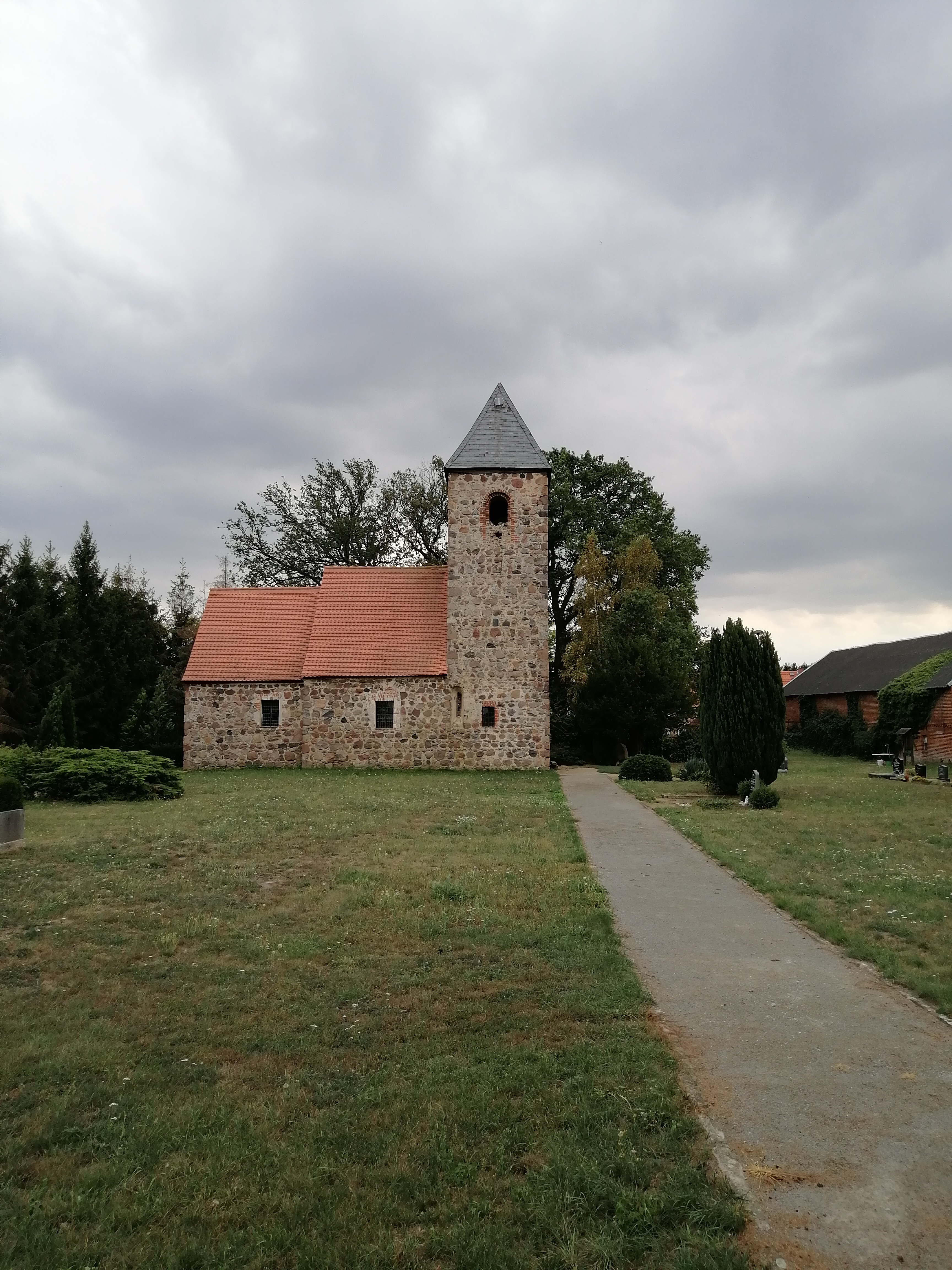 Kirche in 39619 Rademin, Blick vom Friedhof